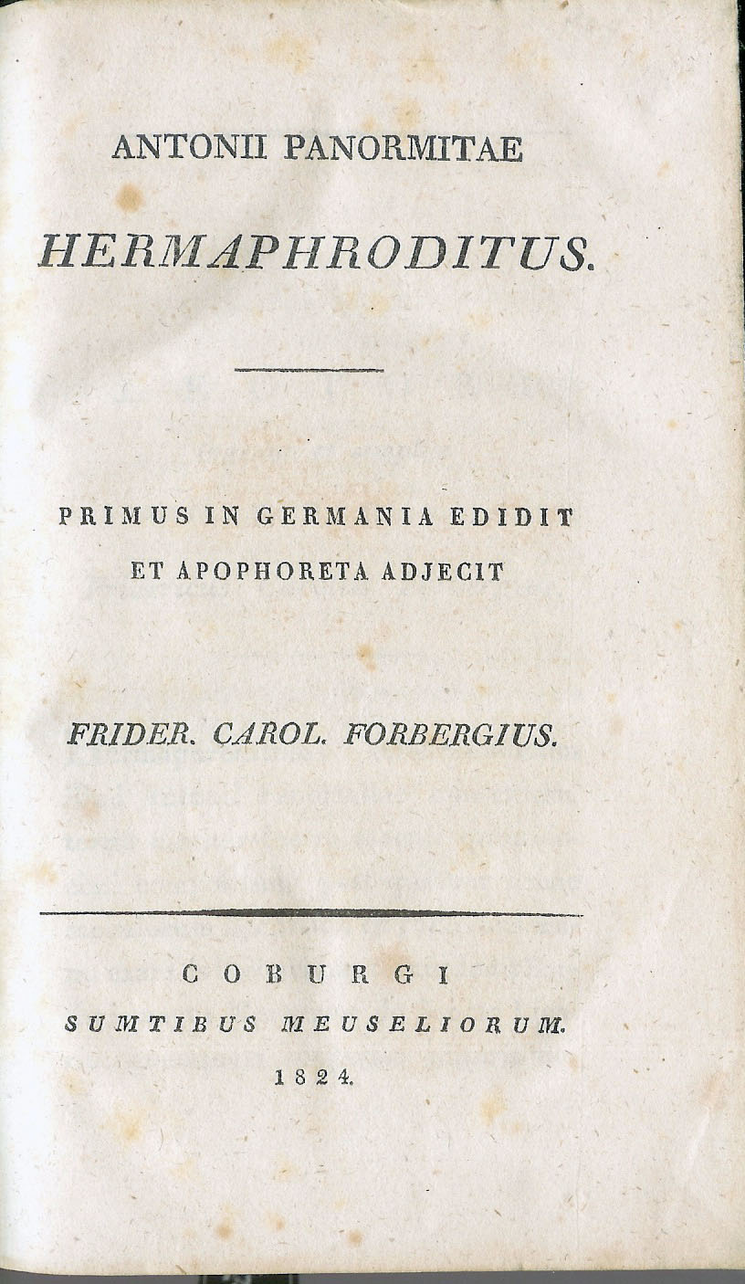 Copie de la page de titre du livre de Forberg Antonii Panormitae Hermaphroditus